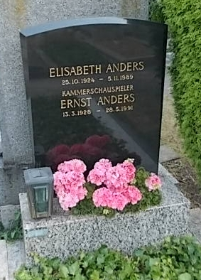 Ernst Anders-Döblinger Friedhof (16-7)